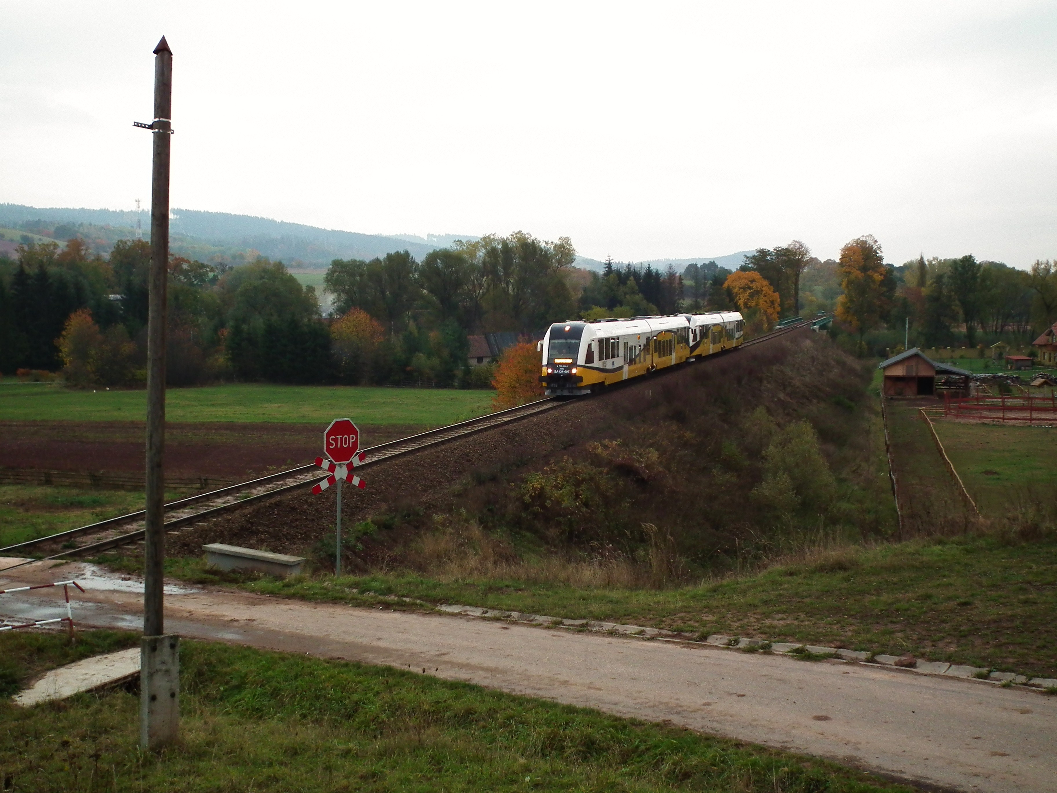 Impreza kolejowa Dolnośląskie Zakamaeki II w dniu 17 października 2015r. na liniach kolejowych Dolnego Śląska. Skład pociągu złożony z SA134-003 i SA134--007. Odcinek Ścinawka Śr. - Tłumaczów.